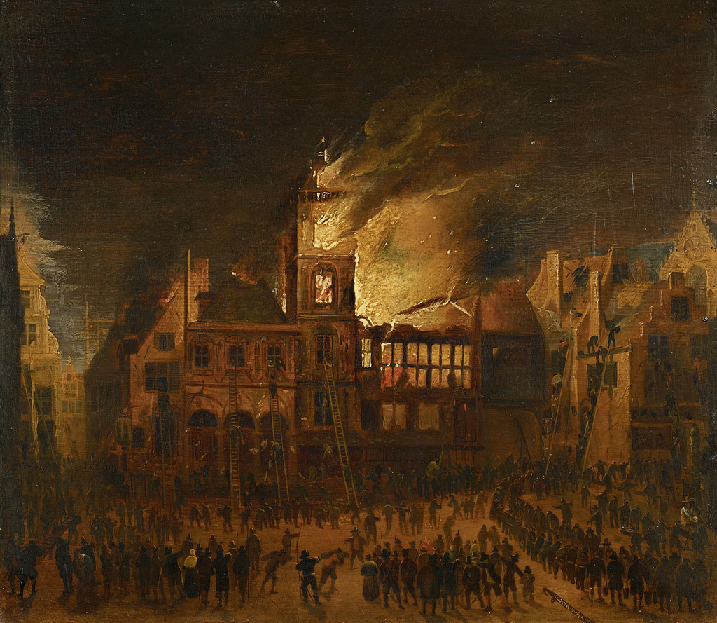 schilderij; geschiedenis Amsterdam; stadsgezicht Amsterdam; brand van het oude stadhuis op de Dam; Stadhuis Amsterdam; Dam